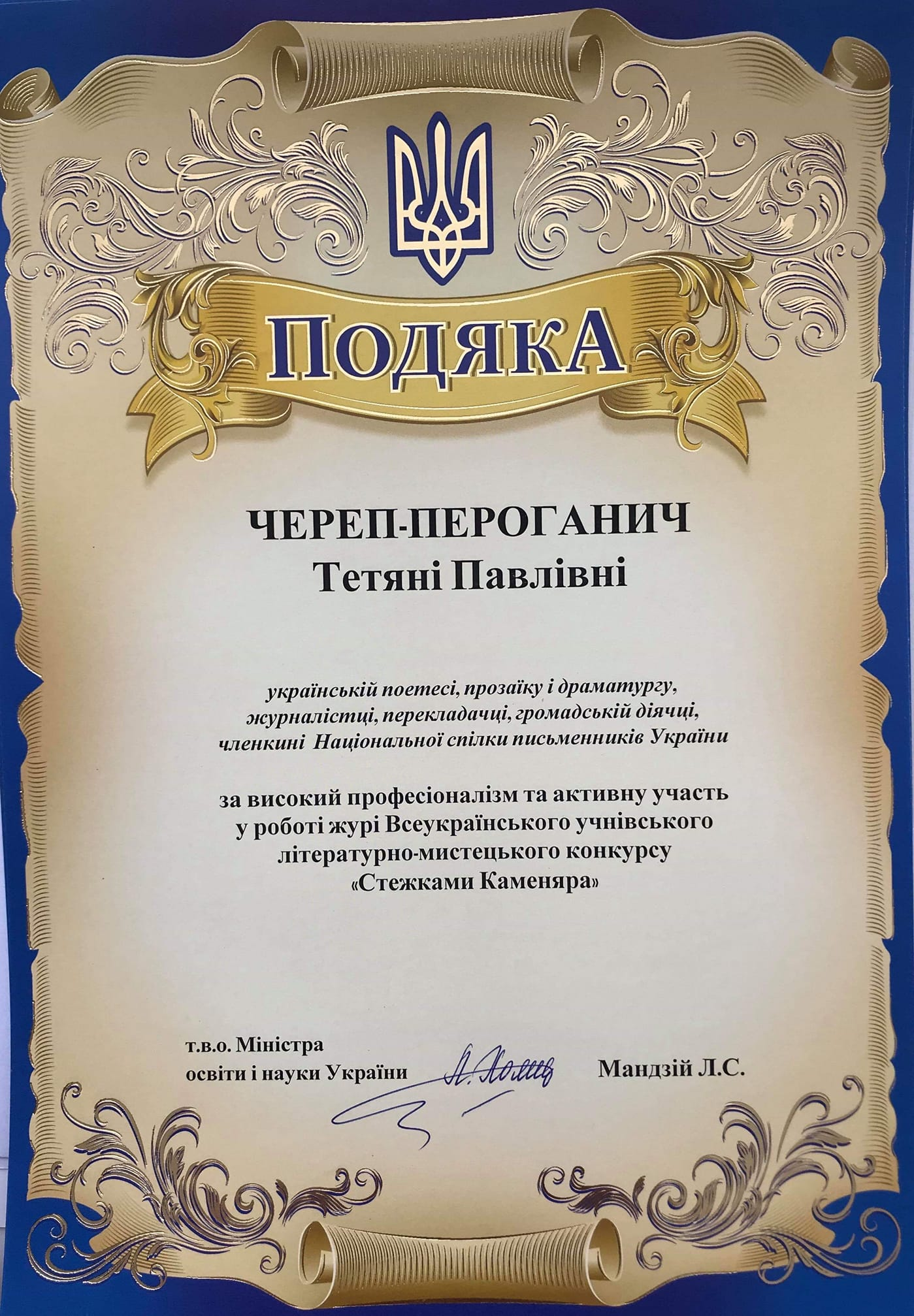 Подяка Міністра освіти і науки України Тетяні Череп-Пероганич